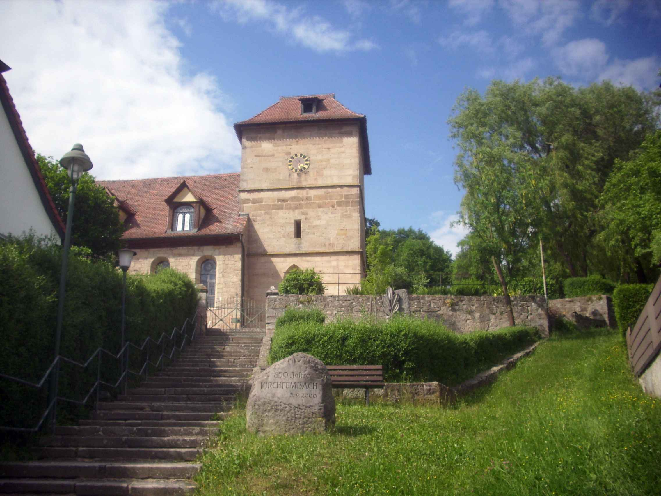 Kirchfembach-Ansicht von Süden mit Kirche (Kirchturm als Chorturm) über Kirchhofmauer in erhöhter Lage am Ortsrand-28052012